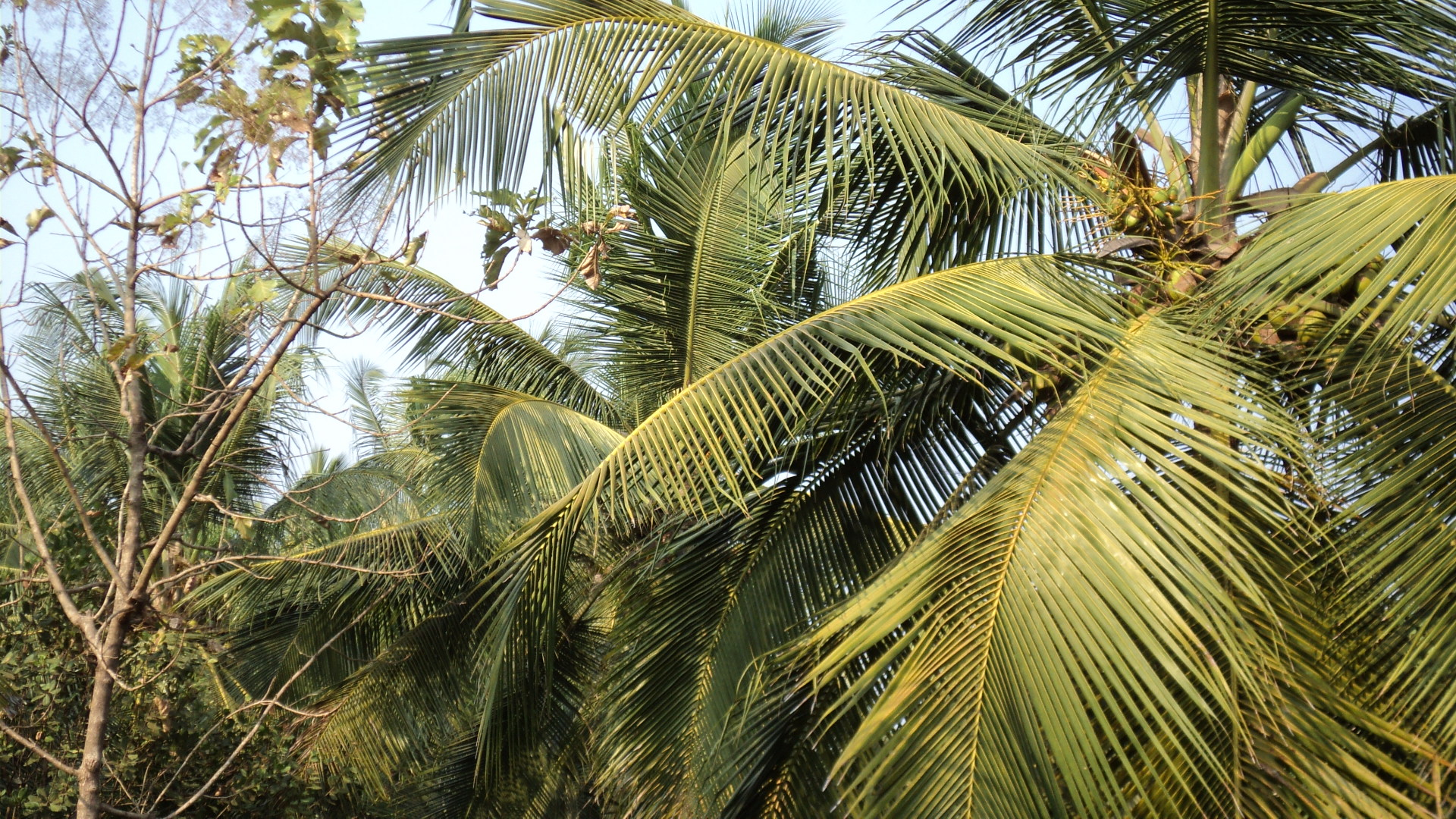 Coconut trees in Kalpakanchery, Kerala, India